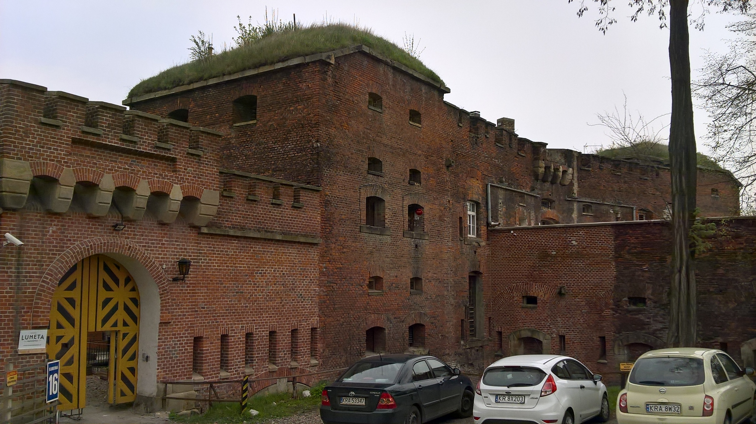 Fort reditowy 12 (IVa) „Luneta Warszawska” Twierdzy Kraków.